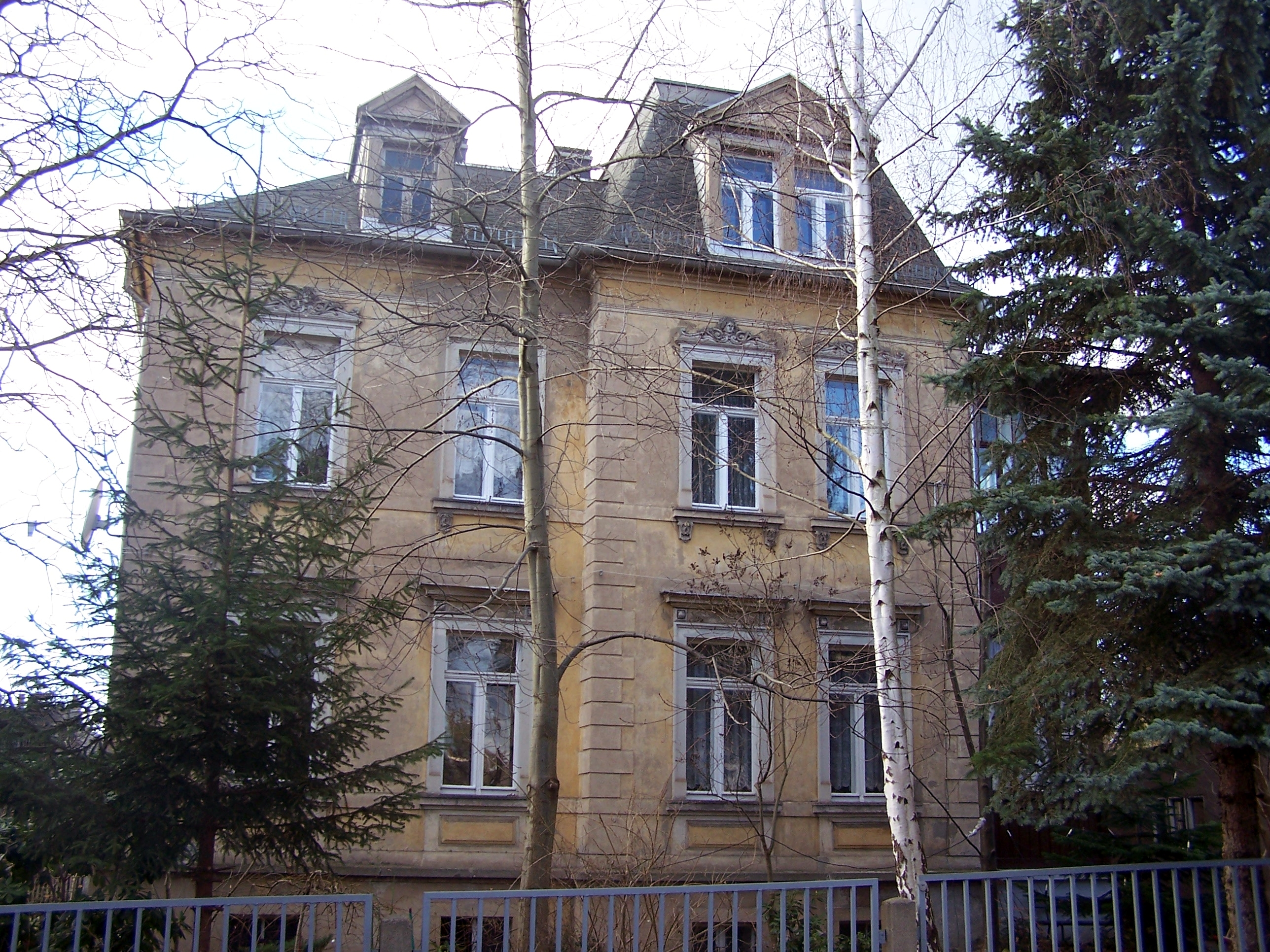 Hauptstr 64. in Radebeul